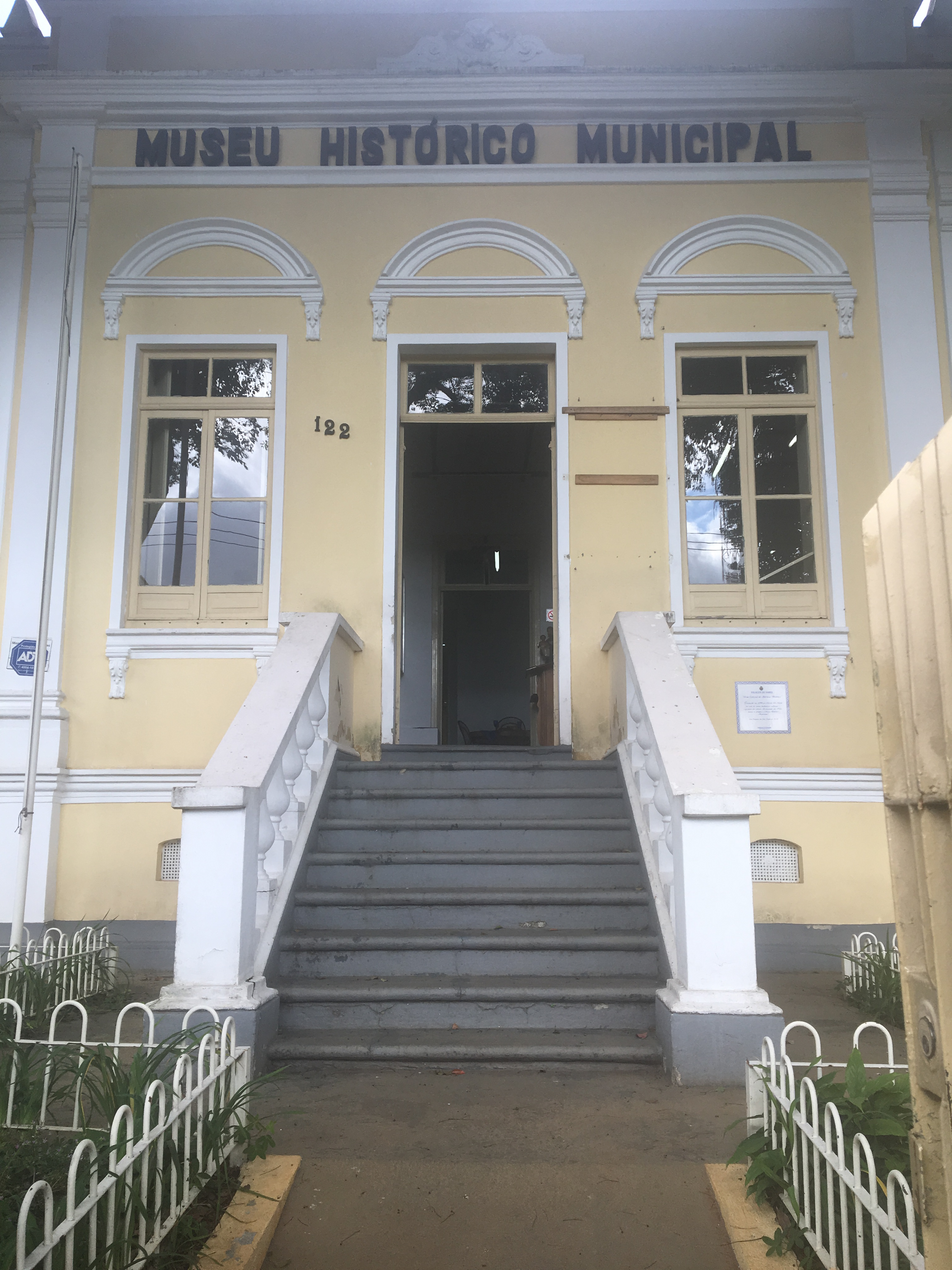 Frente do Museu